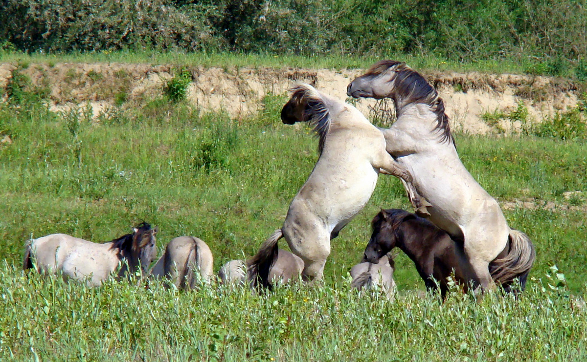 Konik Horses